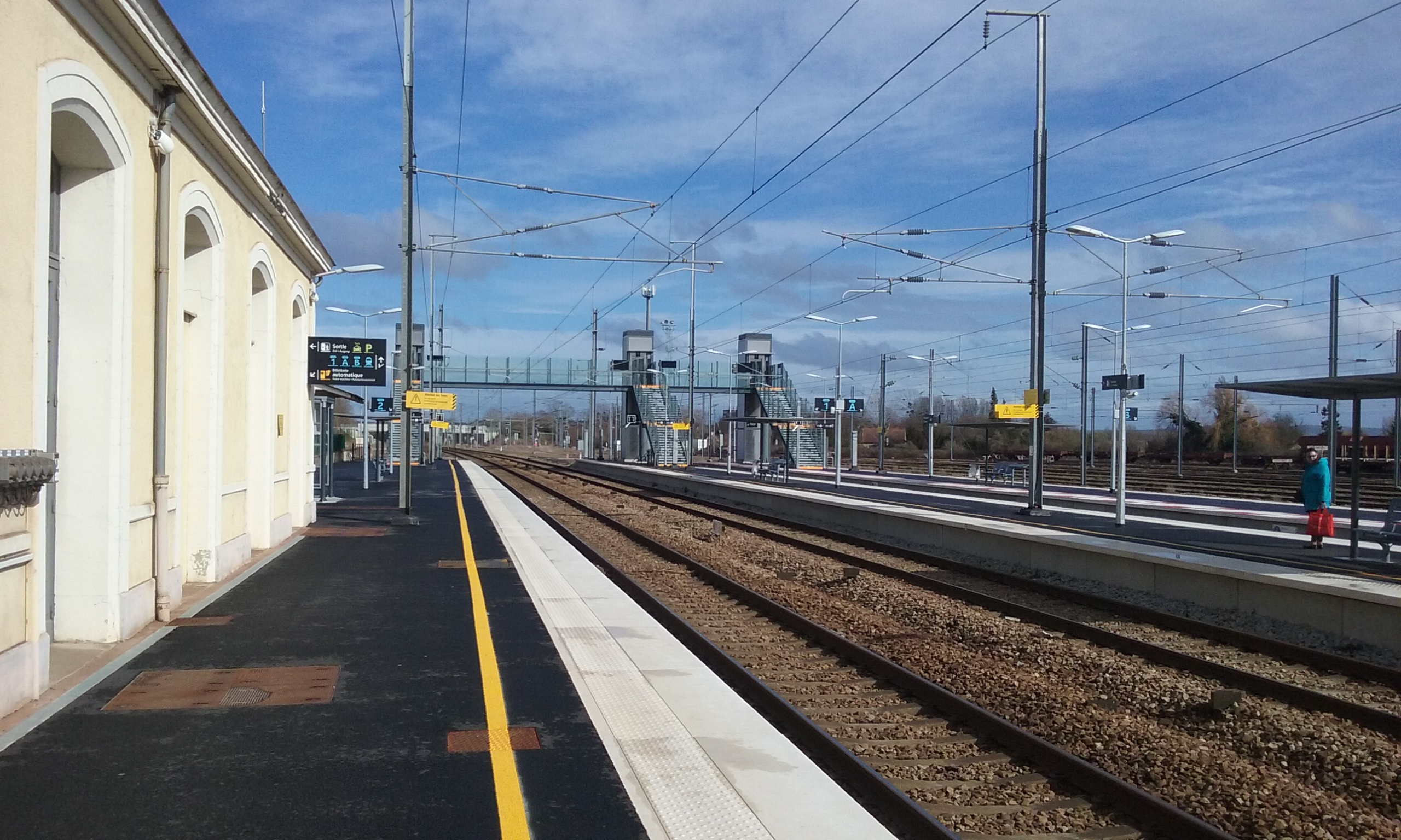 Quai de la gare de Mézidon-Canon. Photo prise en direction de l'est (Lisieux)